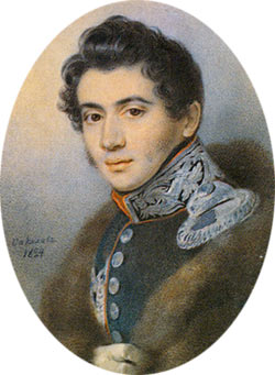 Соколов Петр Федорович. Портрет Никиты Михайловича Муравьева. 1824